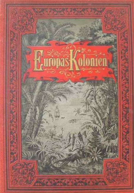 Titelblatt zum Buch "Europas Kolonien" von Hermann Roskoschny (1845-1898)